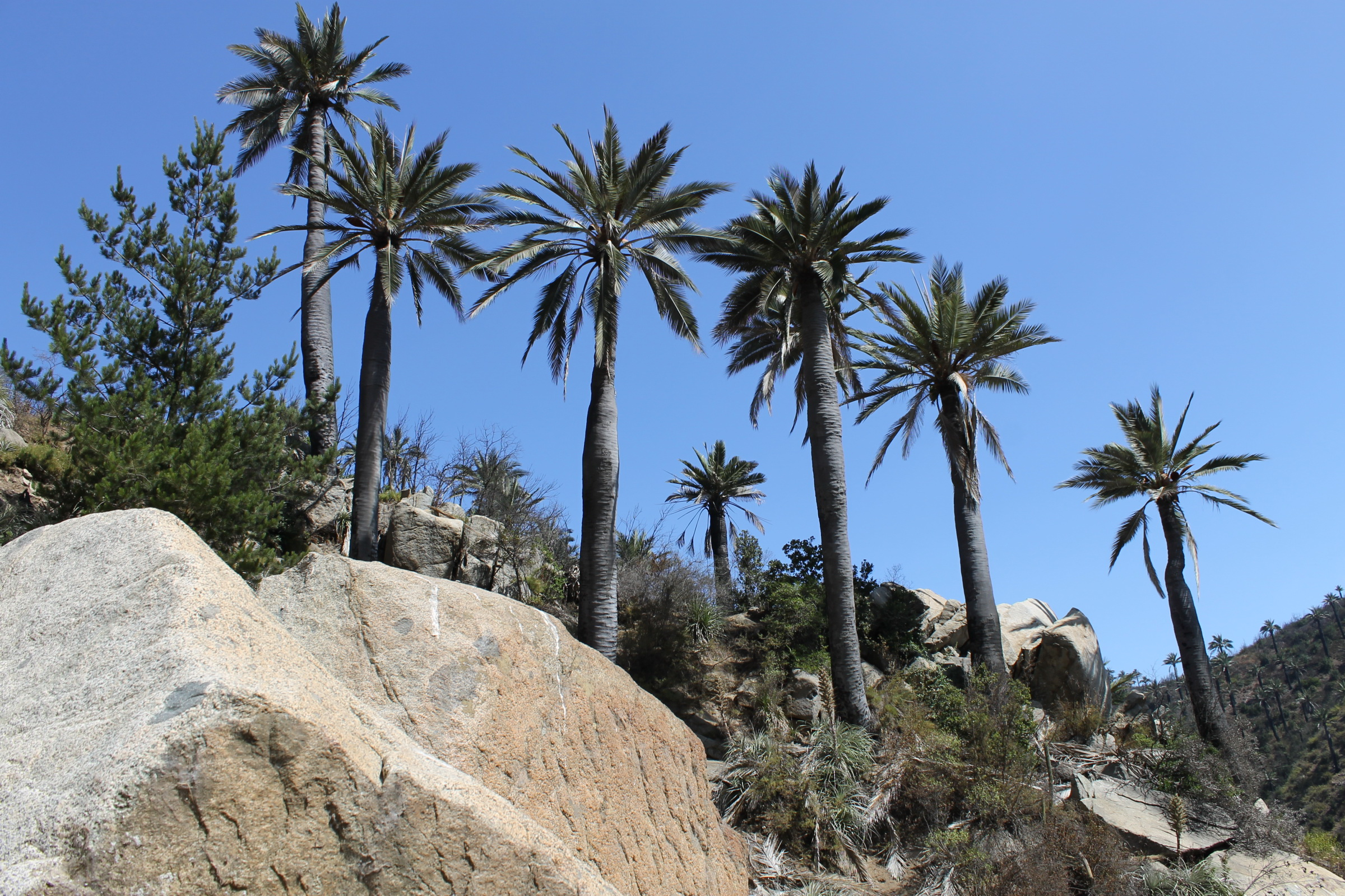 Jubaea chilensis - Palmar El Salto 136